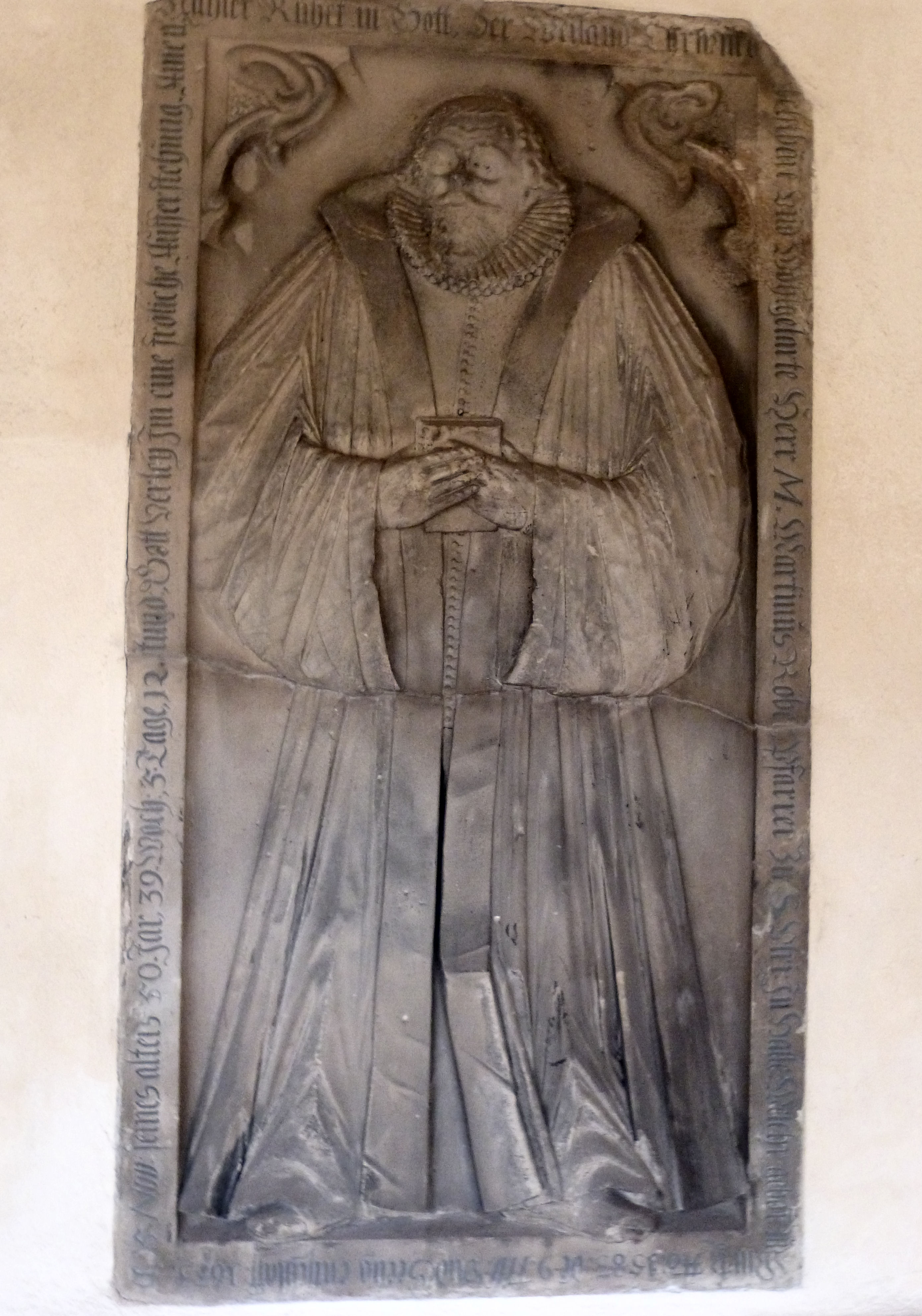 Epitaph von 1635 für den Pfarrer von St. Ulrich, Martin Röber (1583-1633), im Grabbogen 12 (Grab der Felicitas von Selmenitz), Halle (Saale)